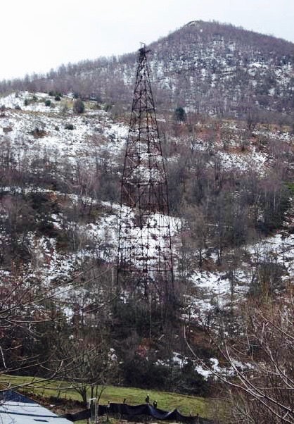 Torre de baldes en La Collada